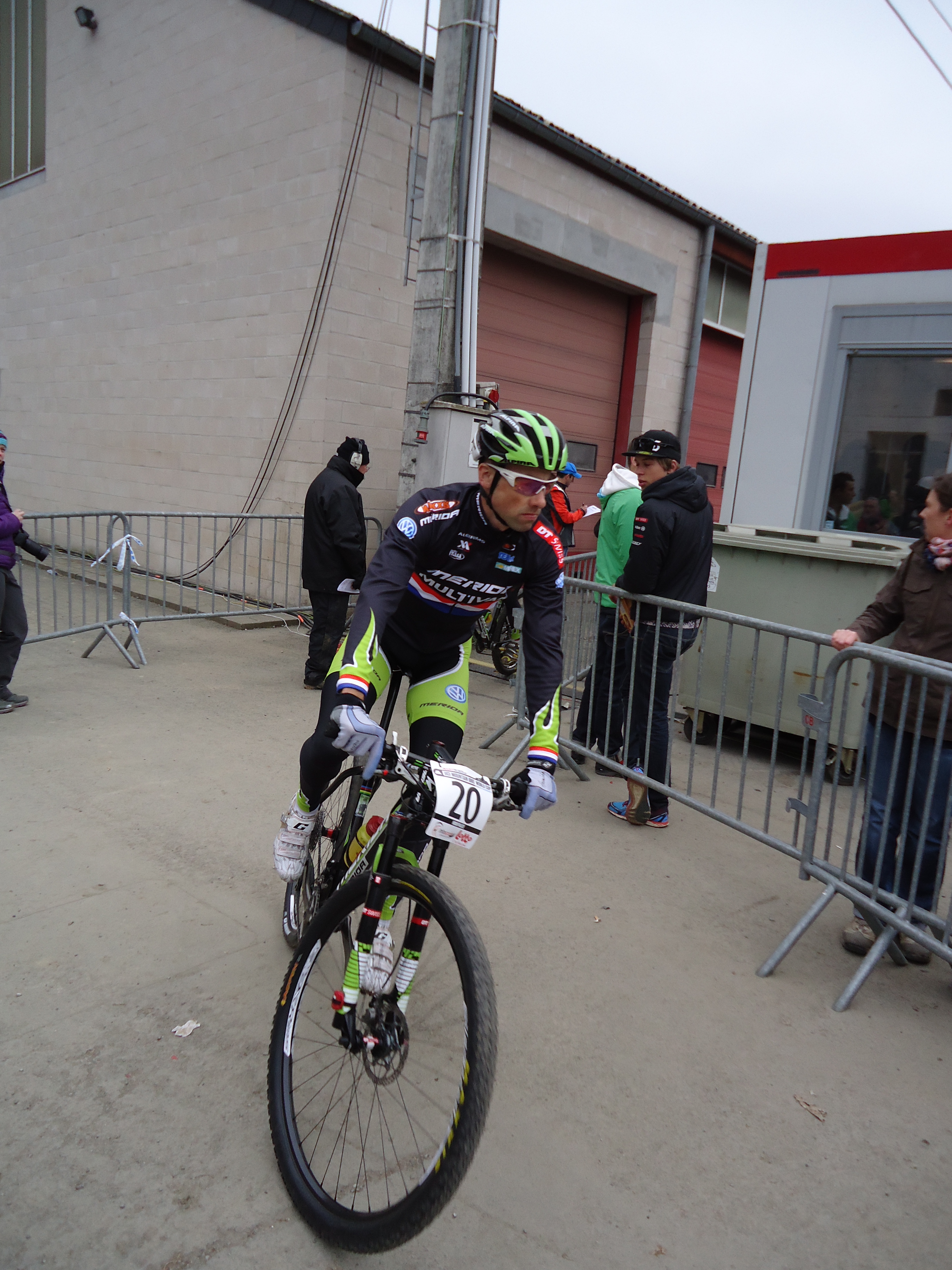 Rudi van Houts vlak voor de start World Cup-manche XCO MTB in Houffalize (BEL).